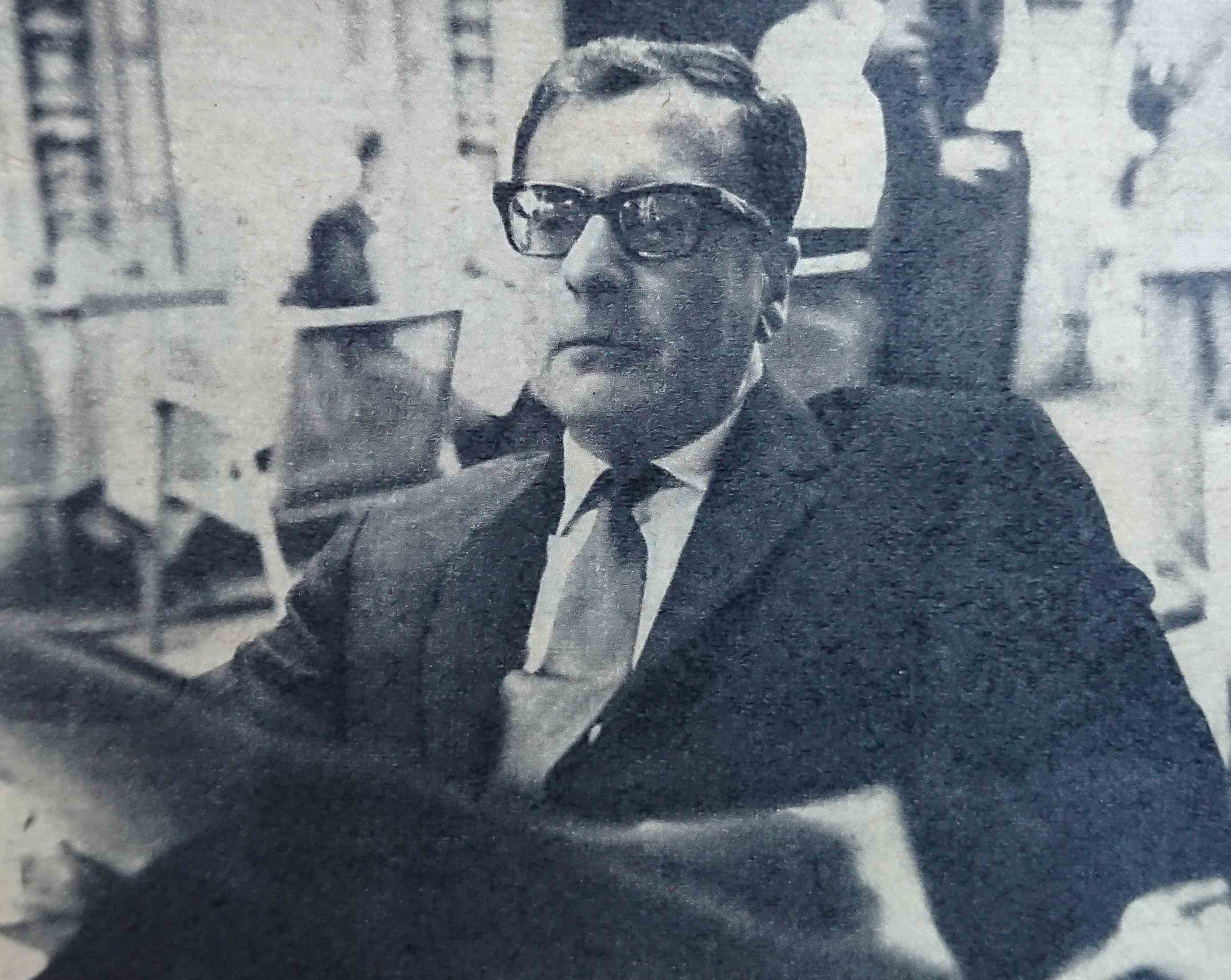 Il giornalista Pier Maria Pasinetti